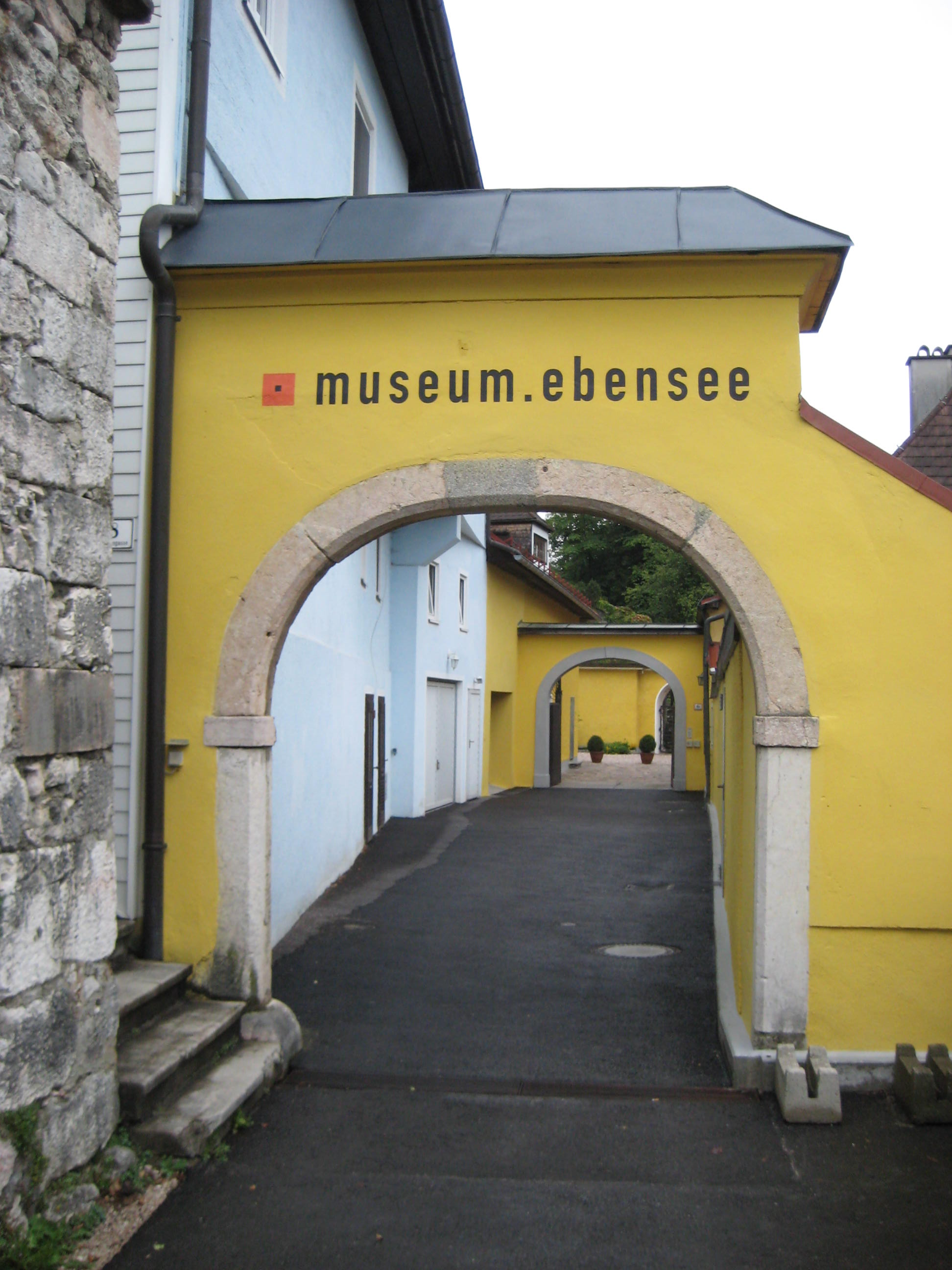 Zugang zum museum.ebensee in Ebensee, Österreich. In dem Gebäude befand sich zwischen 1605 und 1852 das "Verwesamt". Der Verweser war Direktor der Saline, verwaltete die Forsten, war Bürgermeister, kommandierte die Polizei und hatte die Funktion eines Richters inne